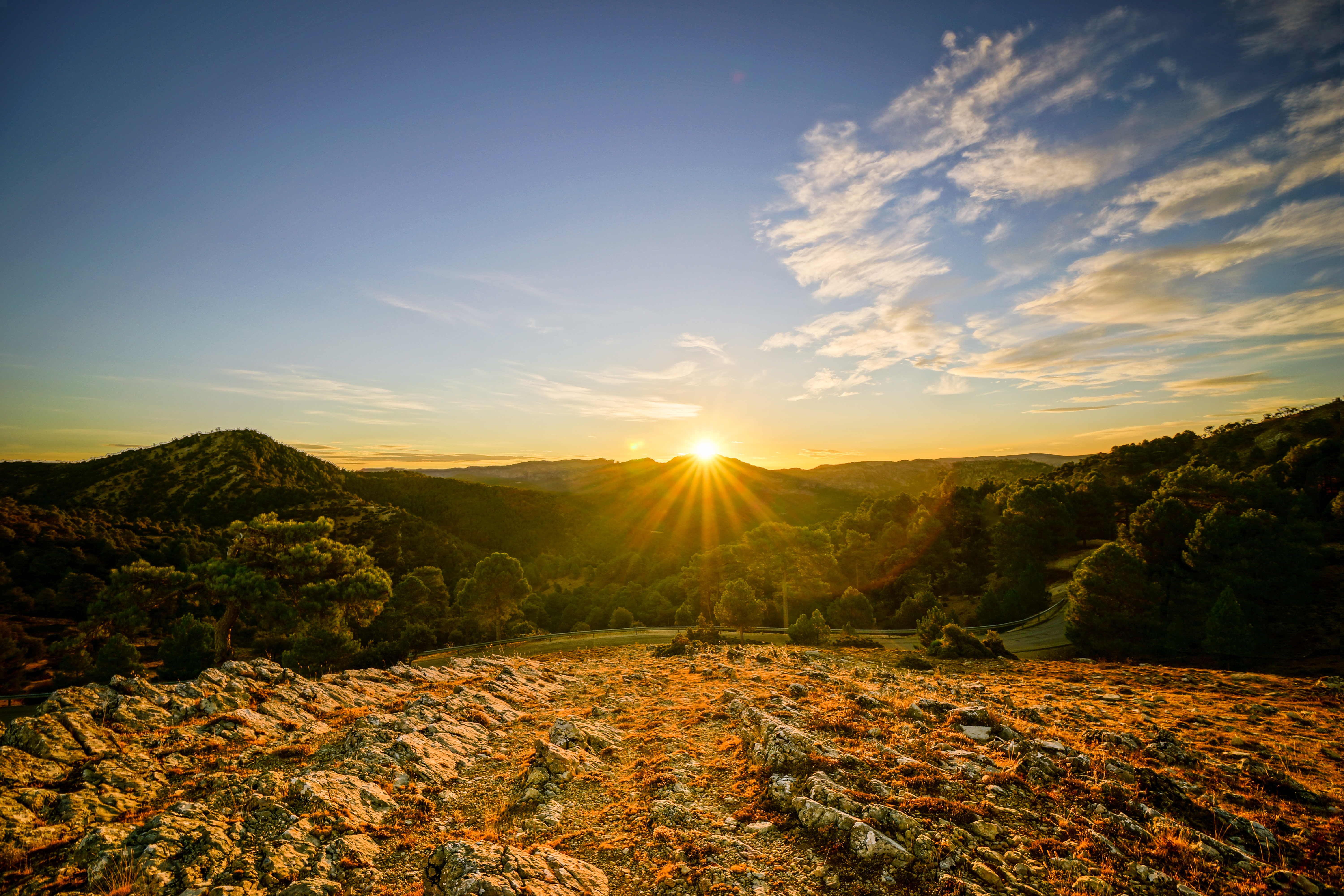 Parque natural de las Sierras de Cazorla, Segura y Las Villas. This is a photography of a Site of Community Importance in Spain with the ID: ES0000035. Natura2000 entry, EEA entry